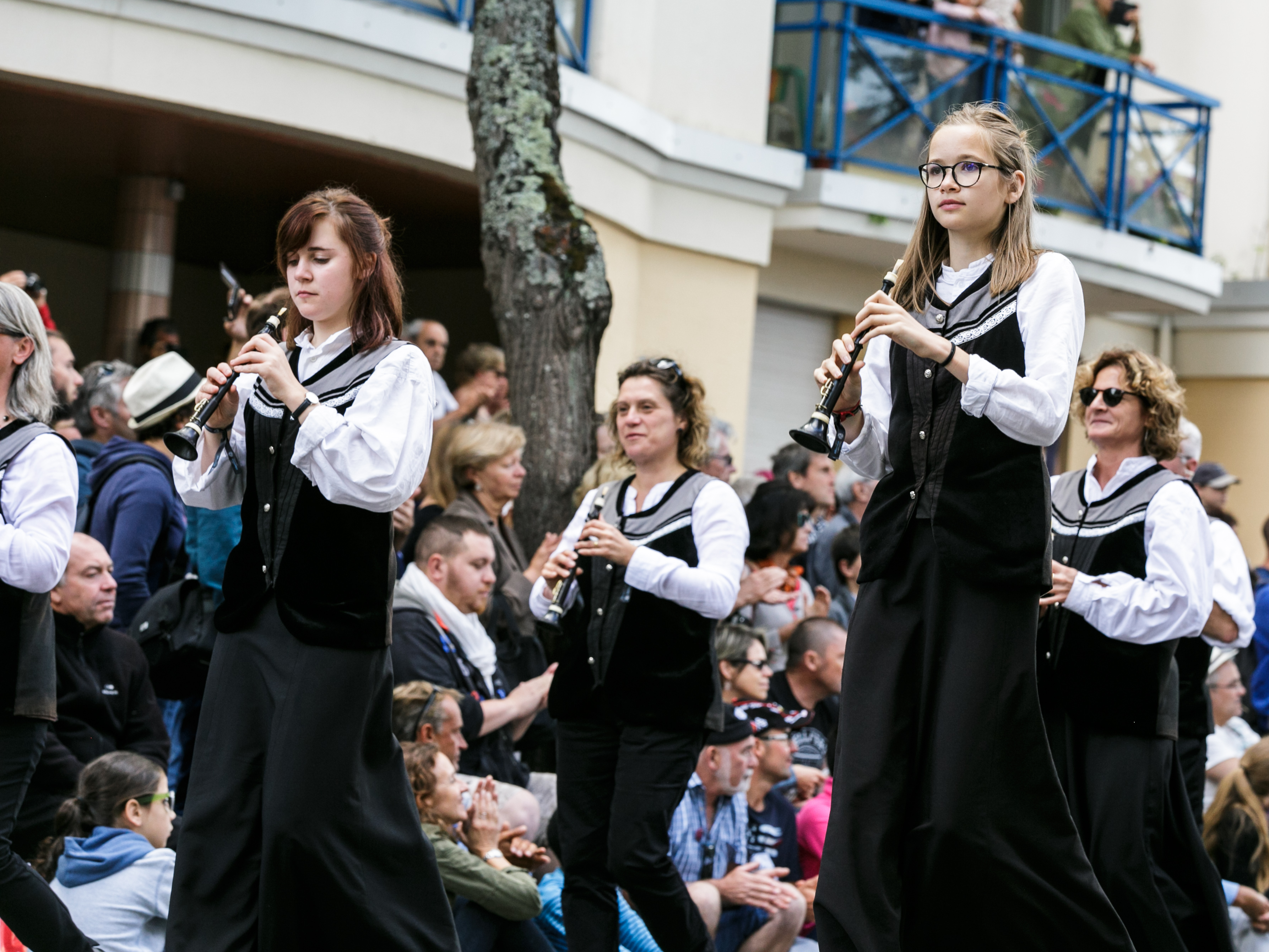 Festival Interceltique de Lorient 2017 - Grande parade des nations celtes - Bagad Dor Vras (Argentré-du-Plessis)